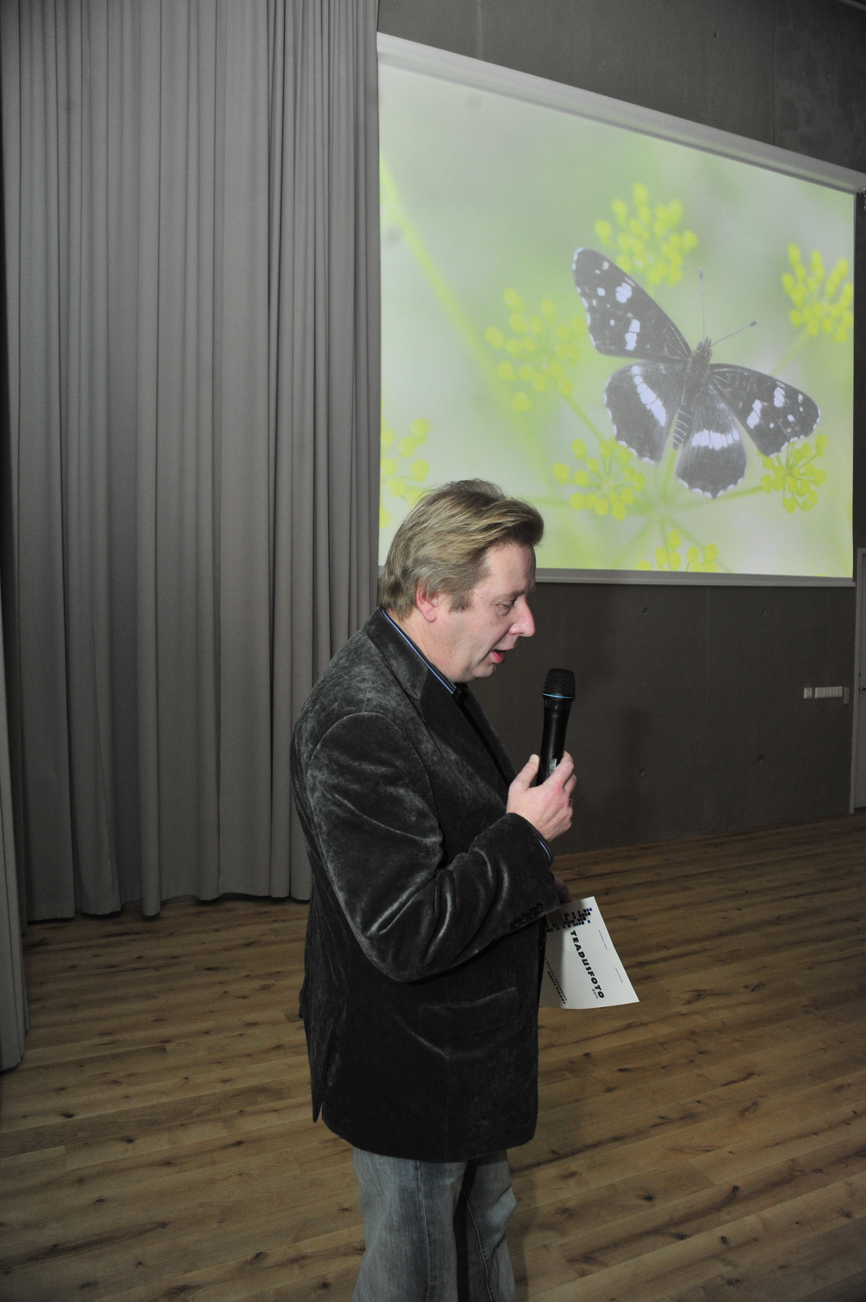 Heiti Paves võtmas vastu eripreemiat parima elusolendit kujutava teadusfoto eest Teadusfoto 2011 lõpuüritusel.